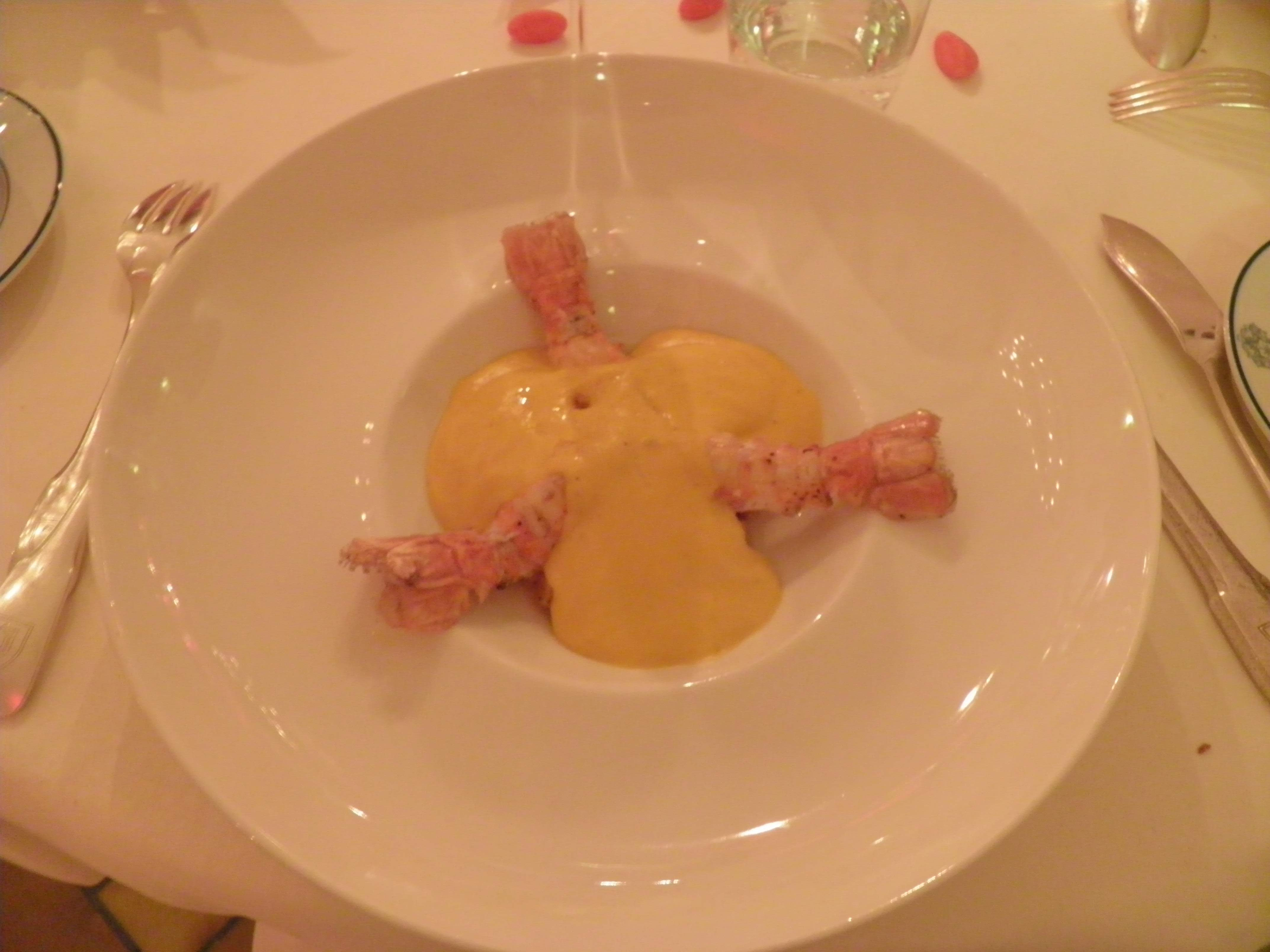 Seconde entrée (queues de langoustine, potimarron crémeux, éclats de noix) au Château d'Isenbourg à Rouffach (Haut-Rhin, France).